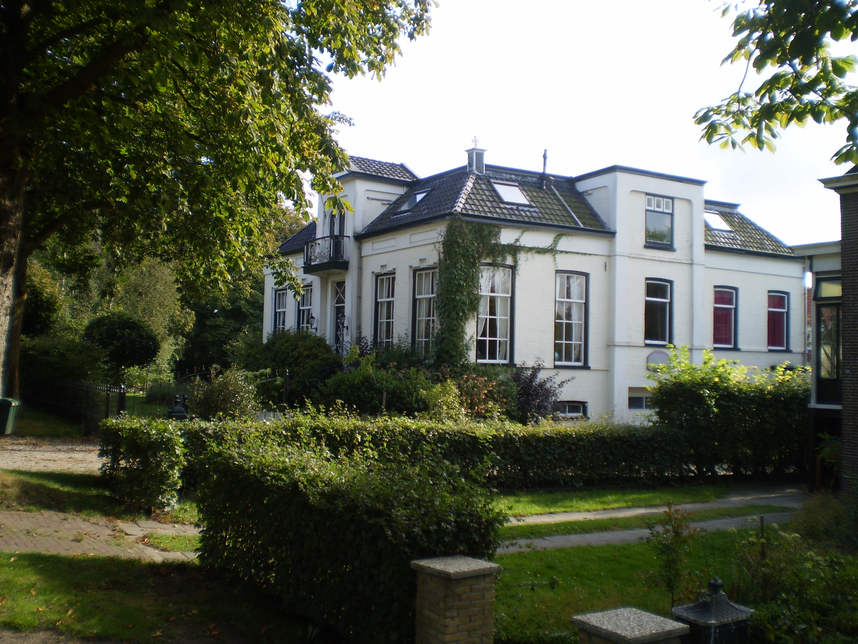 It âlde gemeentehûs te Akkrum fan Utingeradiel